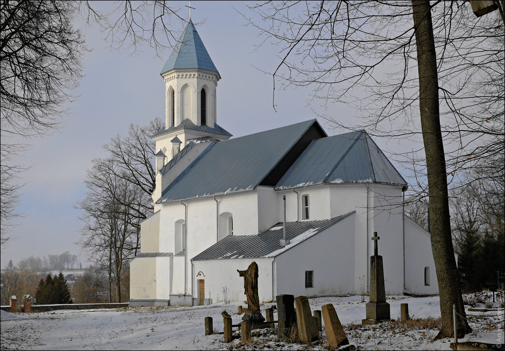 Уселюб. Касцёл Святога Казіміра з боку апсіды